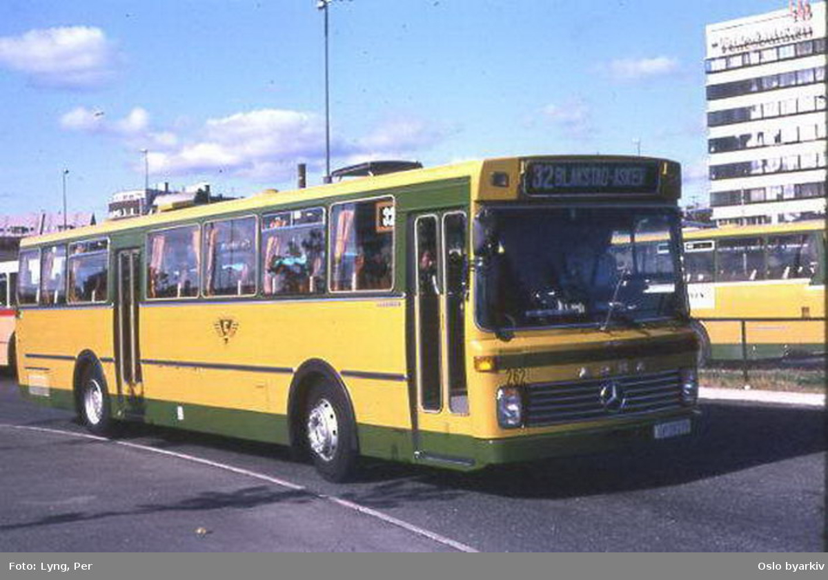 Ing. M.O. Schøyens Bilcentraler (SBC) nr. 262 linje 32 på Grønlands torg rutebilstasjon